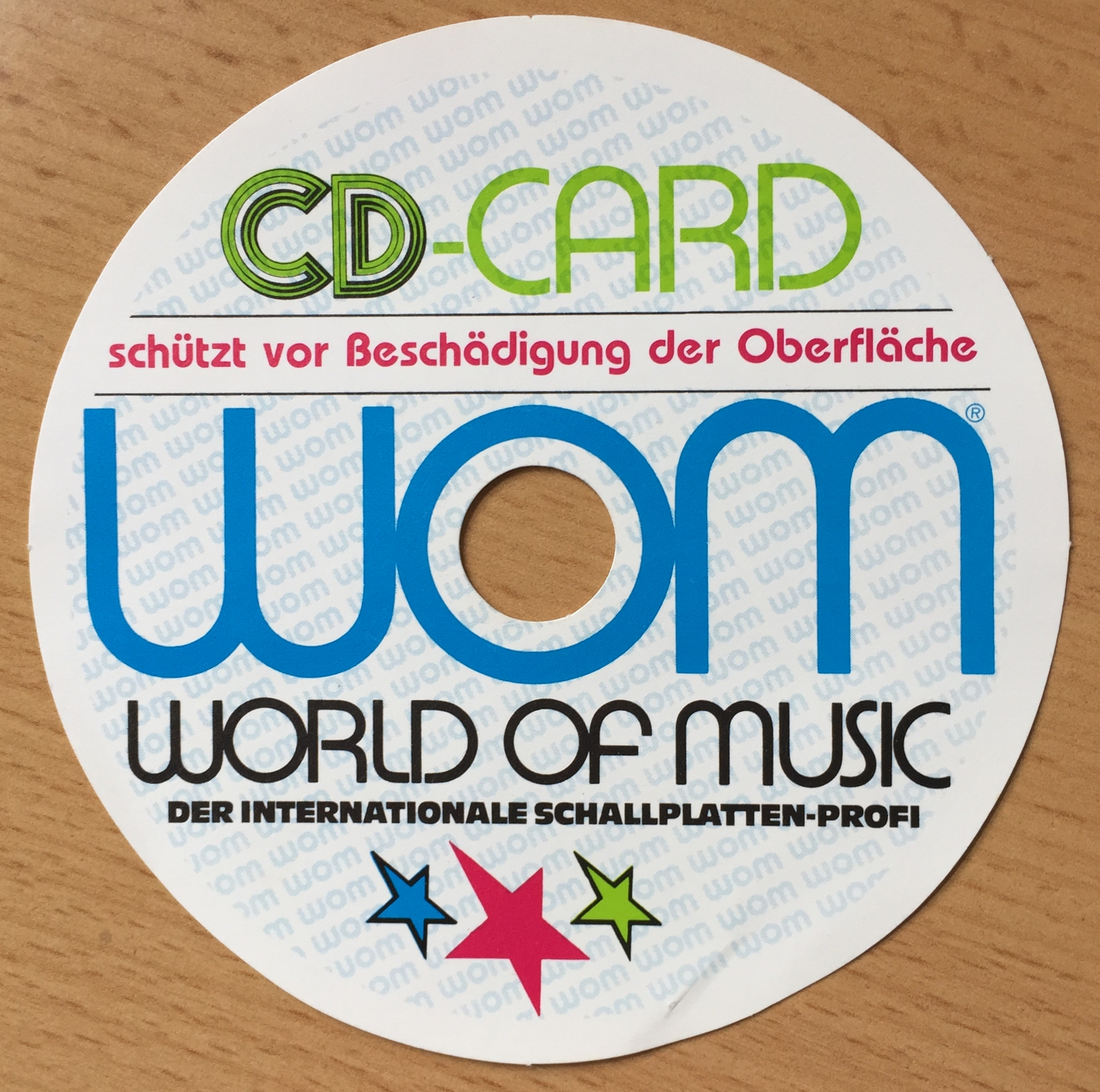 WOM CD-Card (keine SH)